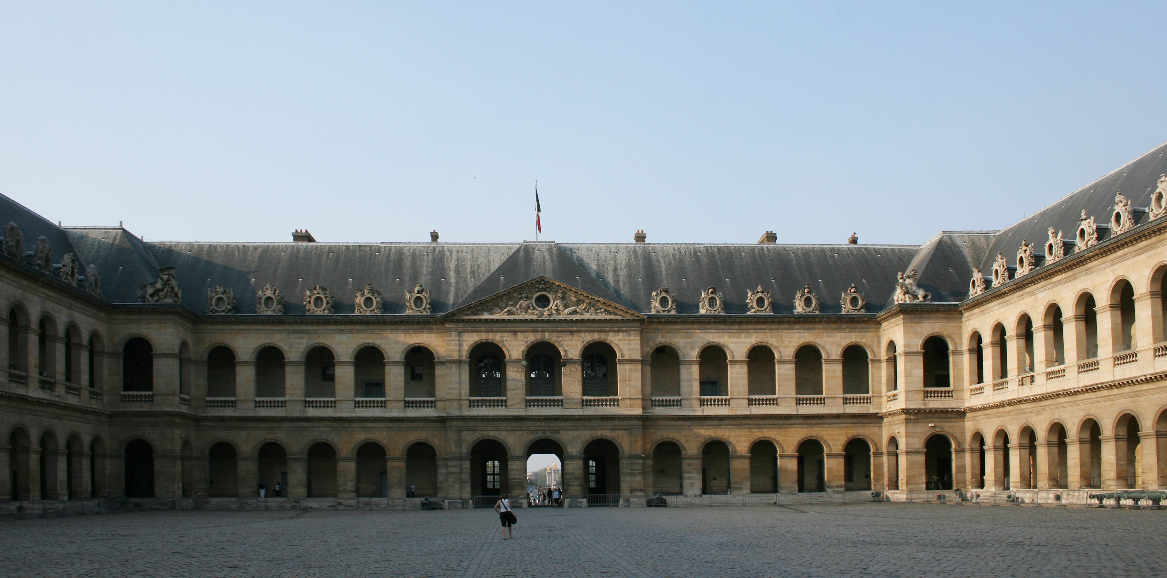 Cour intérieure de l'Hotel des Invalides